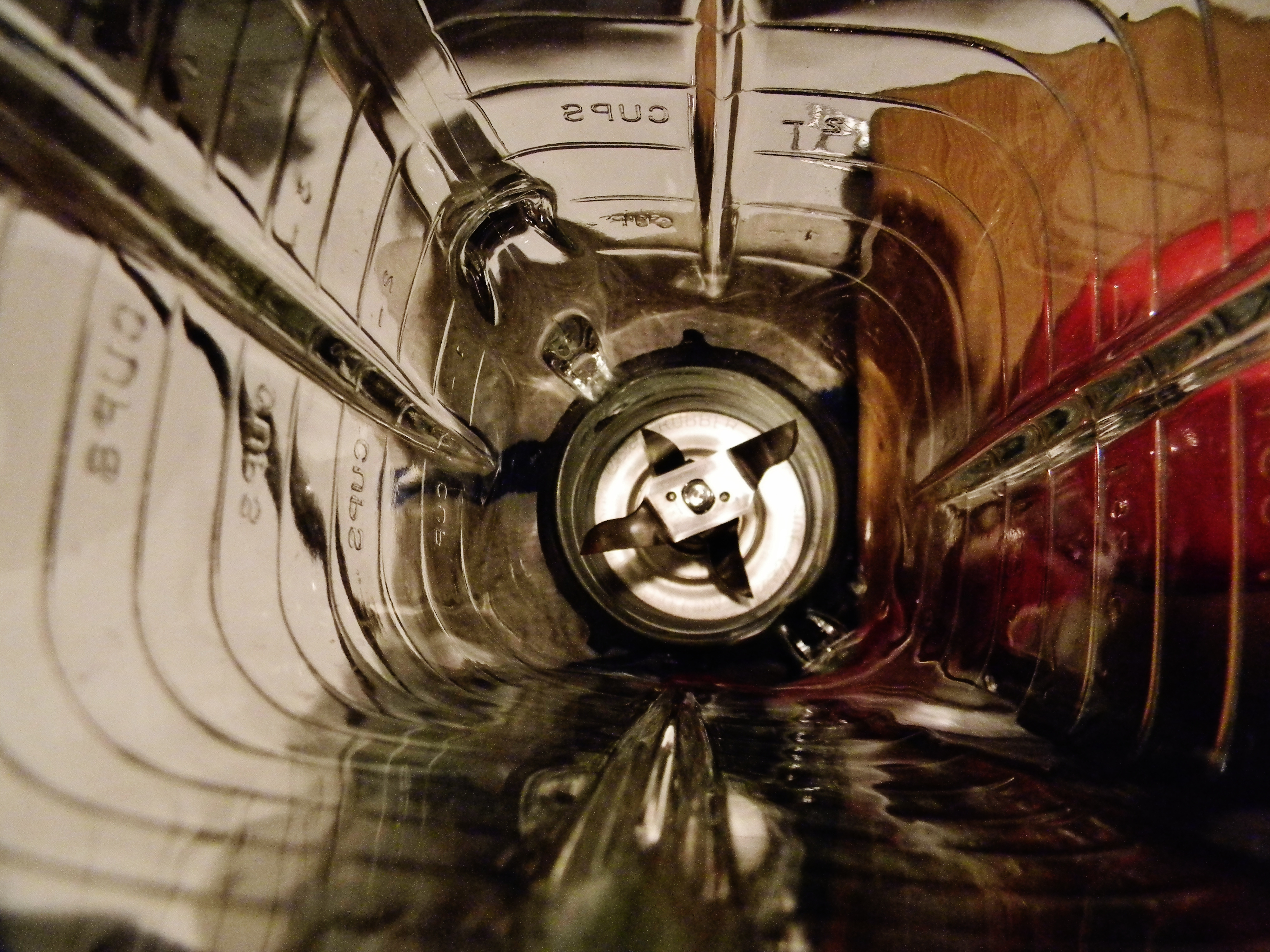 blog